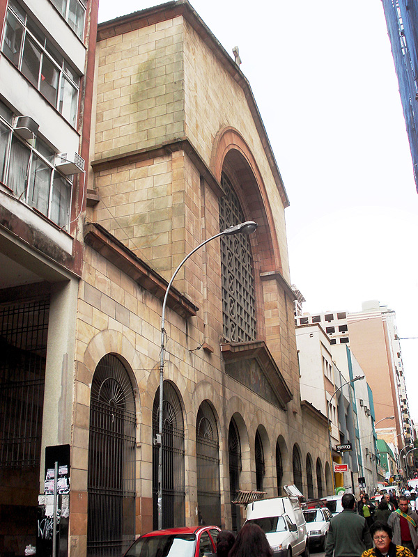 Igreja Nossa Senhora do Rosário, Porto Alegre, Brasil.